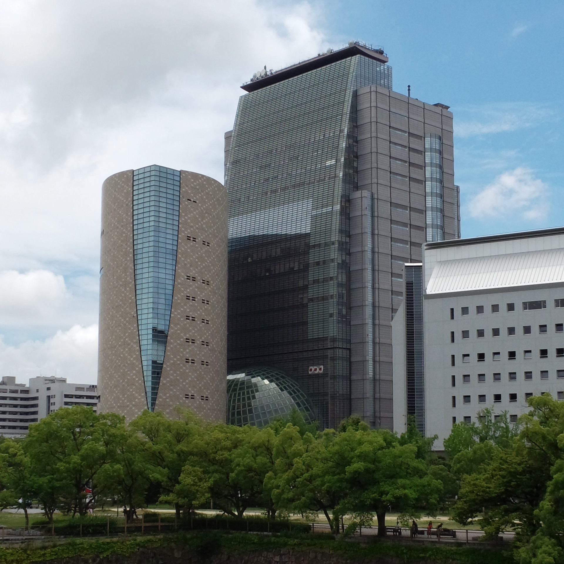 NHK大阪放送局舎ビル